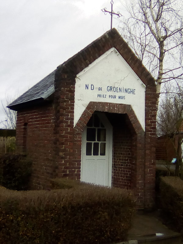 Chapelle Notre Dame de Groeninghe située à Bas Warneton, Belgique / Kapel Onze Lieve Vrouw van Groeninghe, te Neerwaasten, België.